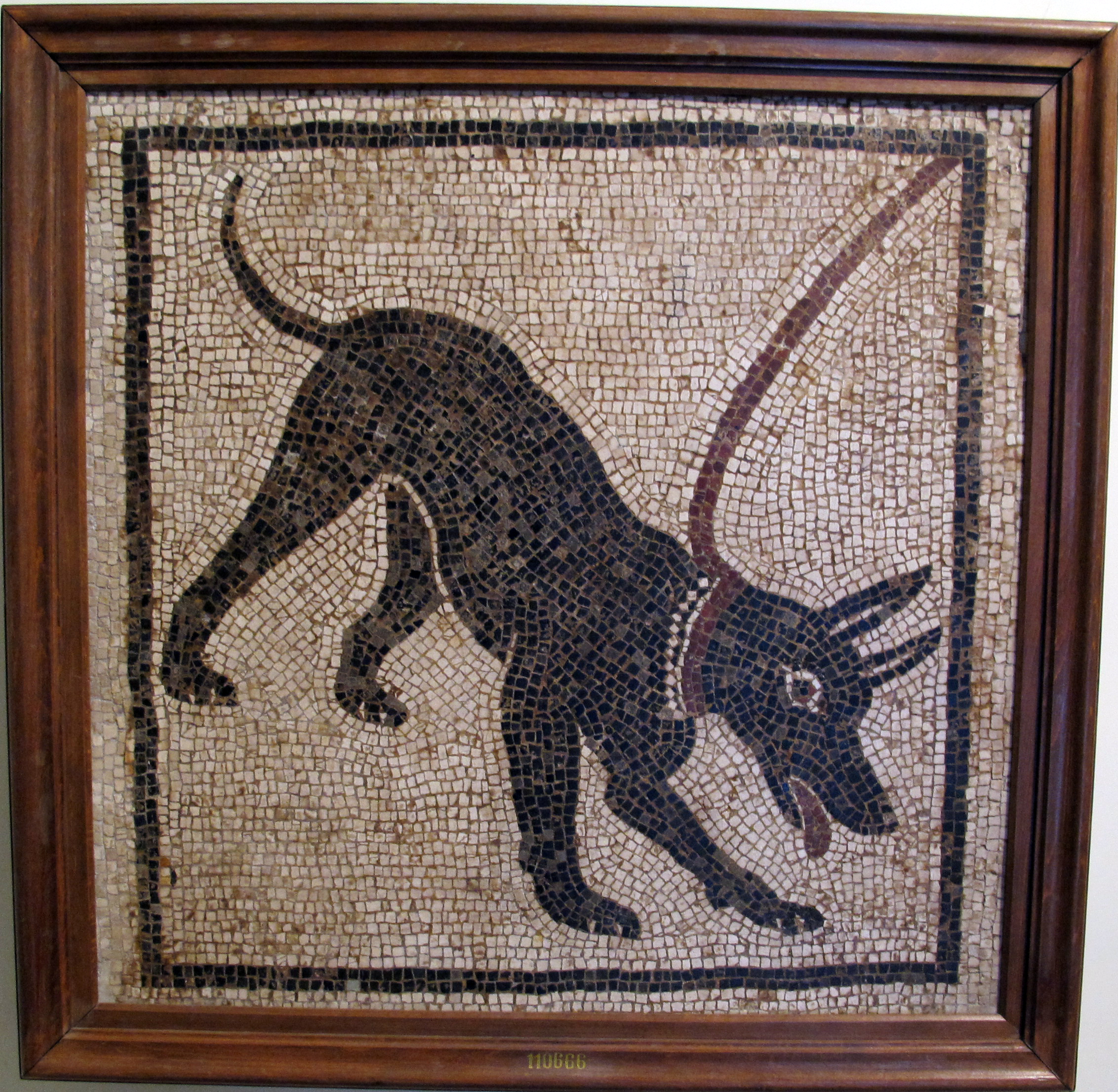 Mosaics in the Museo Archeologico (Naples)